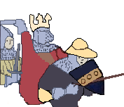 Bataille de Fontenoy-en-Puisaye (841). Détail simplifié de l'enluminure: Mise en évidence de 3 personages ayant chaqun une defense de tete différente. Voir aussi File:Fontenoy_en_puisaye.JPG.